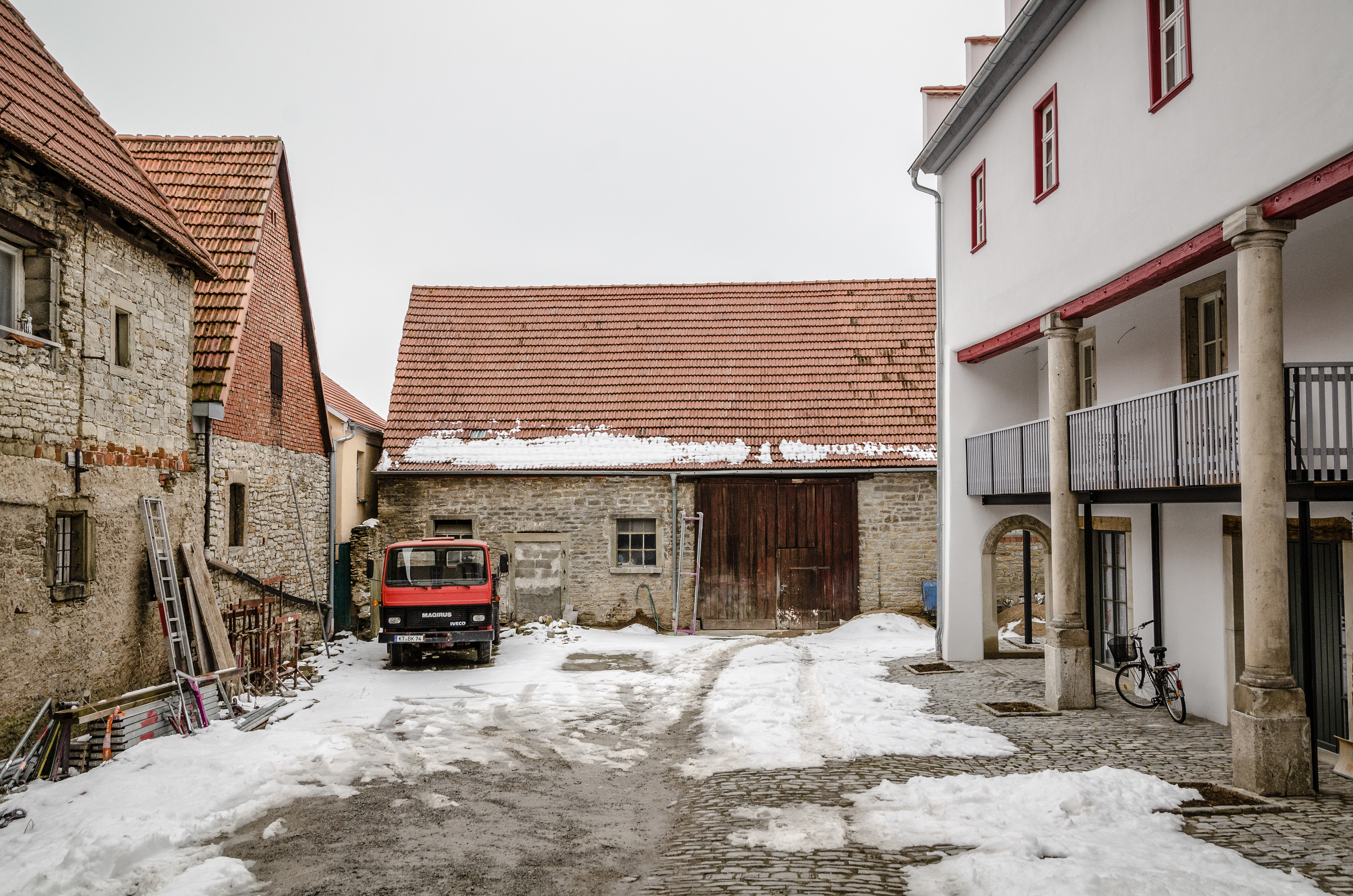 Mainbernheim, Herrnstraße 12, Innenhof